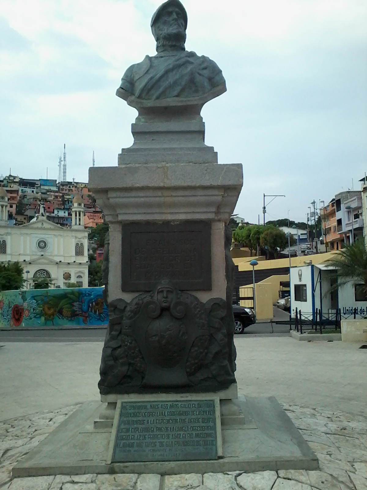 Vista frontal del busto de Francisco de Orellana